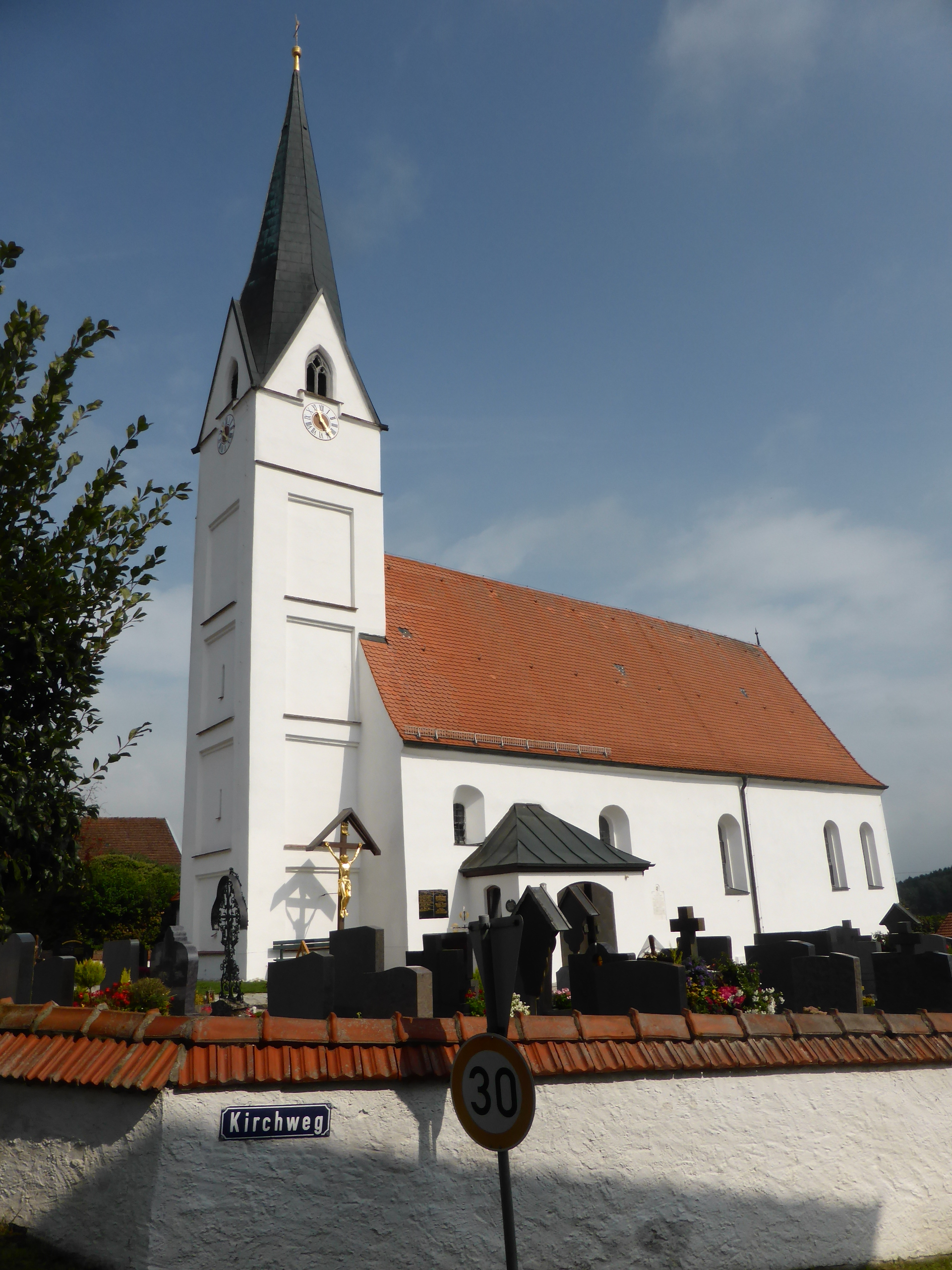 Pfarrkirche Arbing